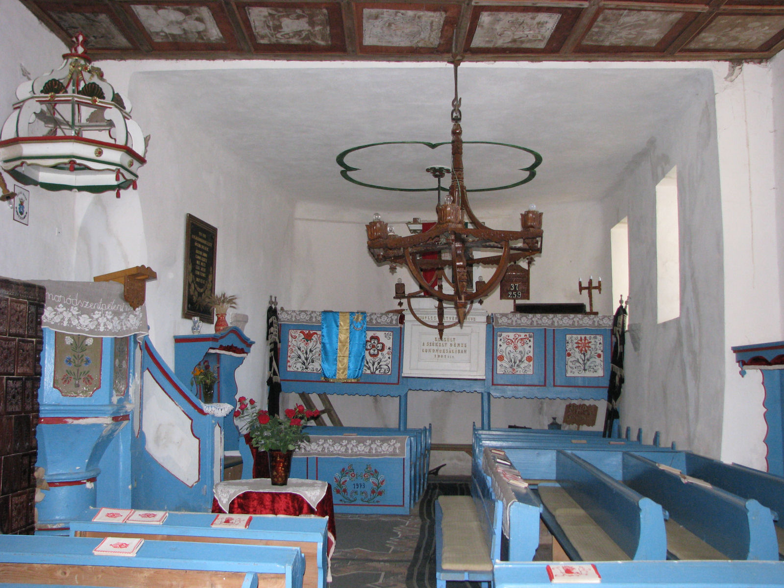 Homoródszentpéteri unitárius templom belseje